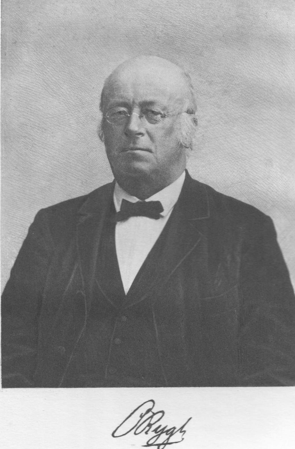 Professor Oluf Rygh (1833–1899) var ein norsk arkeolog og historikar.